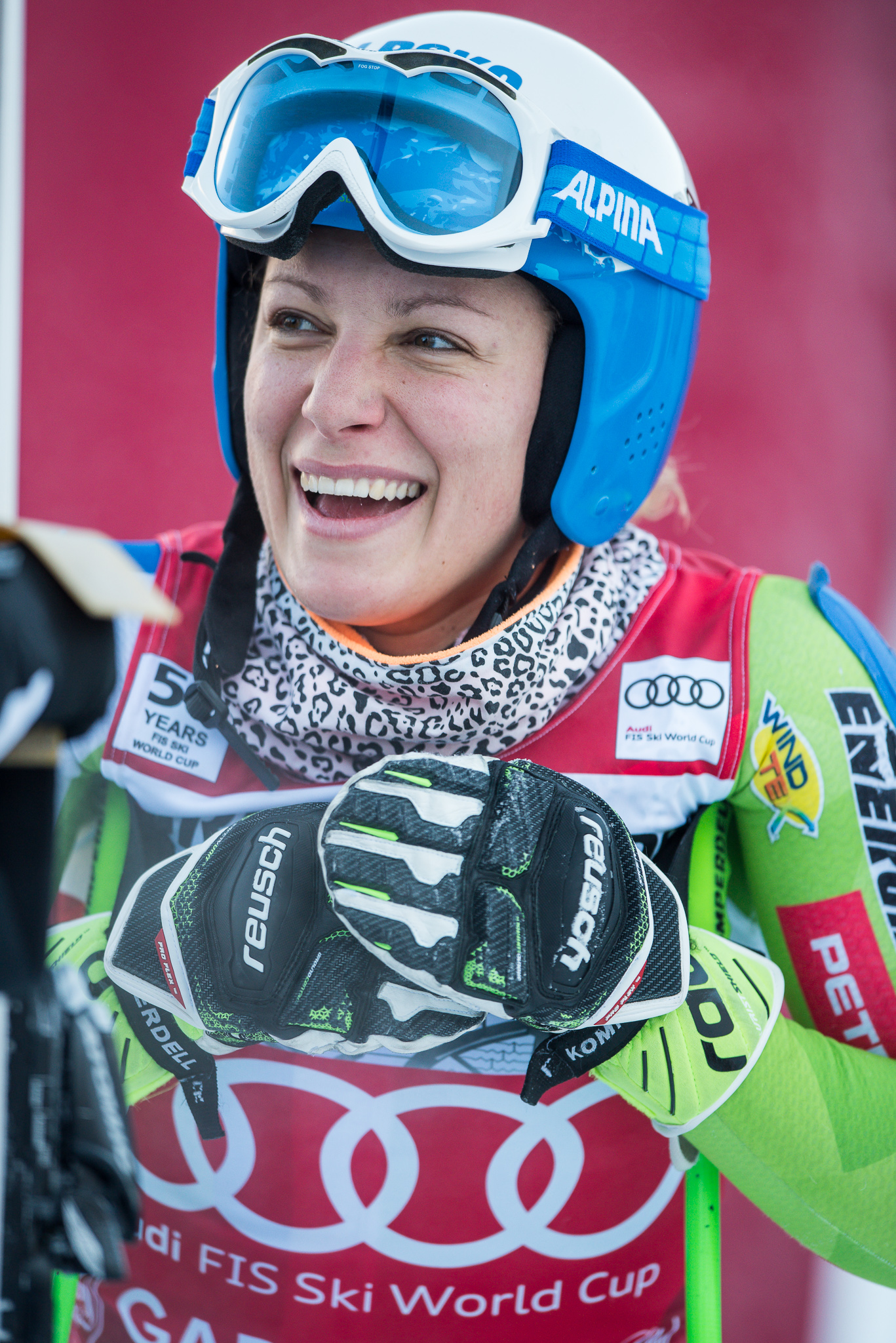 64. Kandahar Rennen,Audi FIS Ski Weltcup Garmisch-Partenkirchen,Damen Abfahrt,Ilka Stuhec,Ilka Štuhec,Kandahar,Ladies Downhill